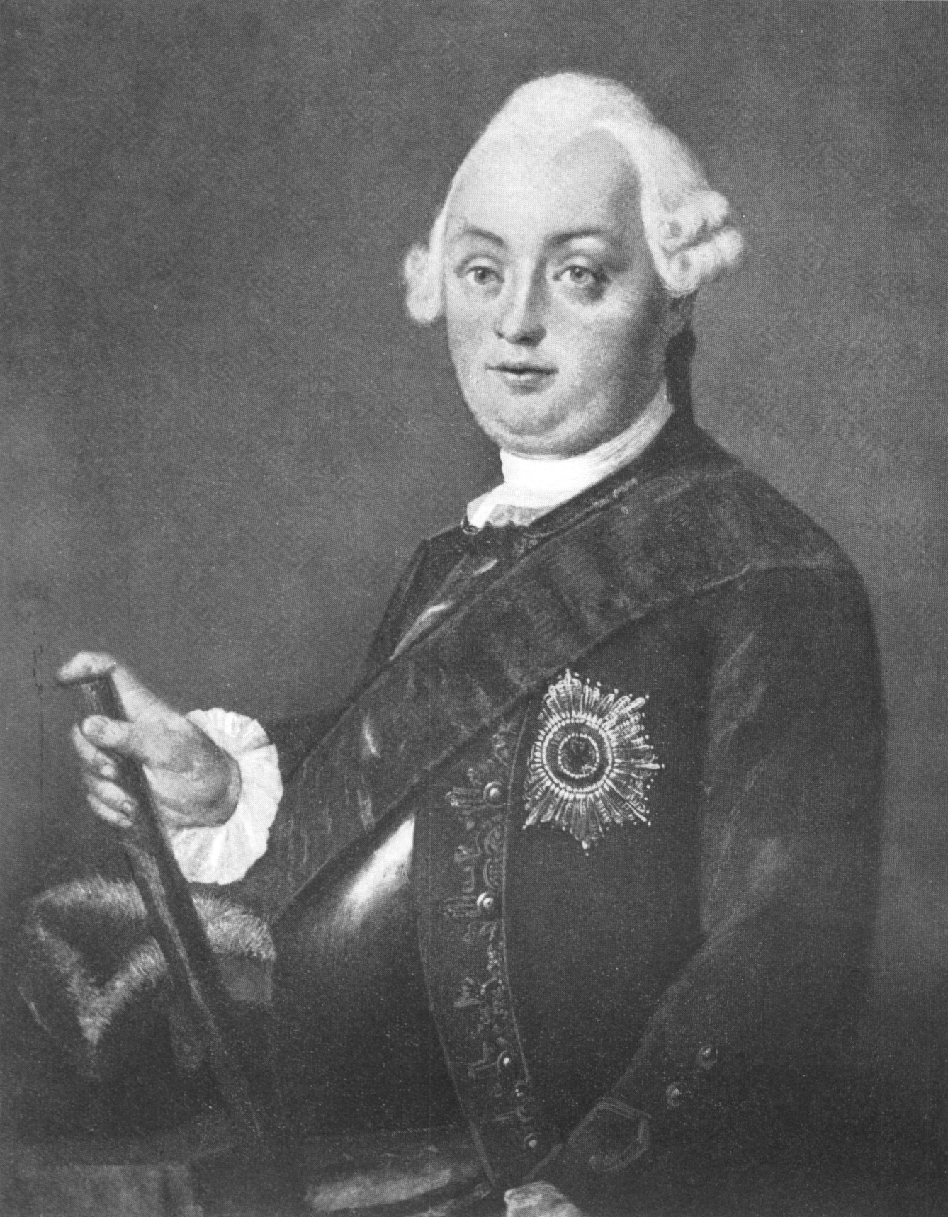 Joachim Friedrich von Stutterheim (02.11.1715-26.08.1783) Generalleutnant, Generalinspekteur der Infanterie, Gouverneur in Preußen